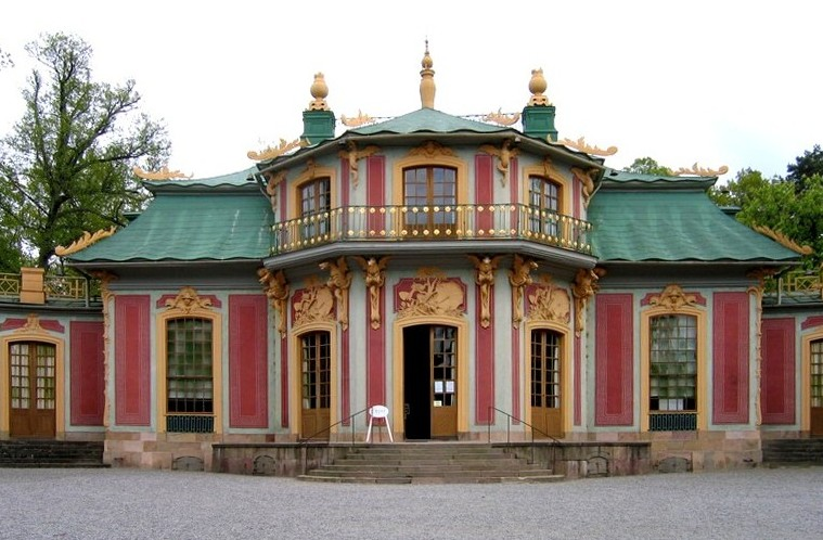 Kina slott,Stockholm, Sweden